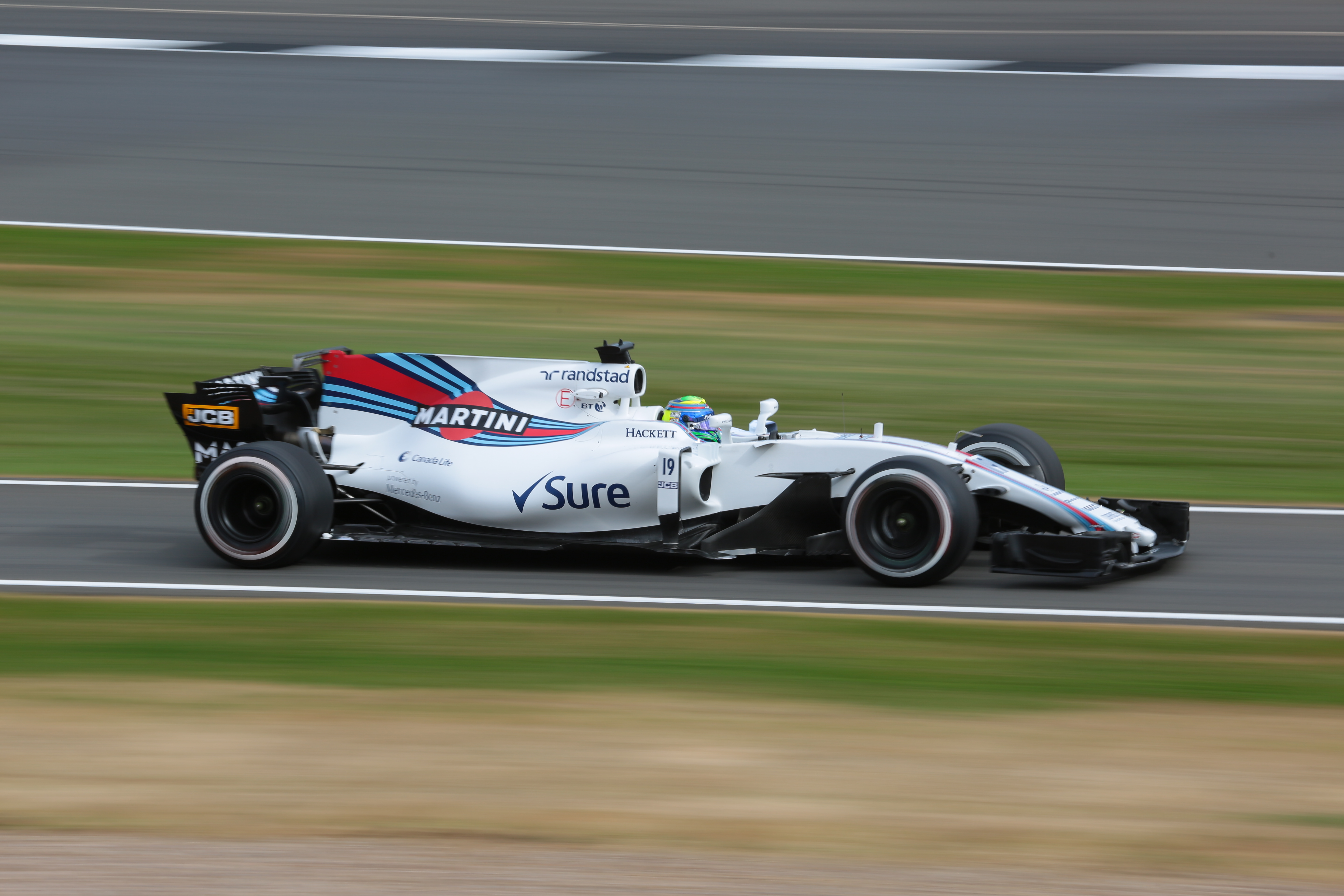 f1